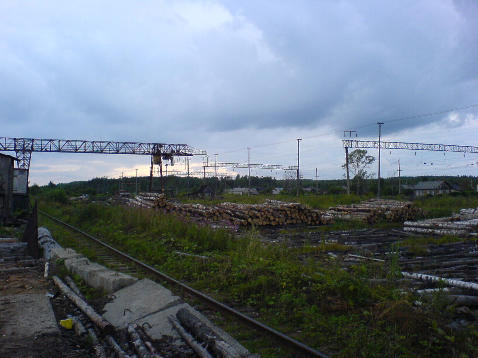 Варакинский